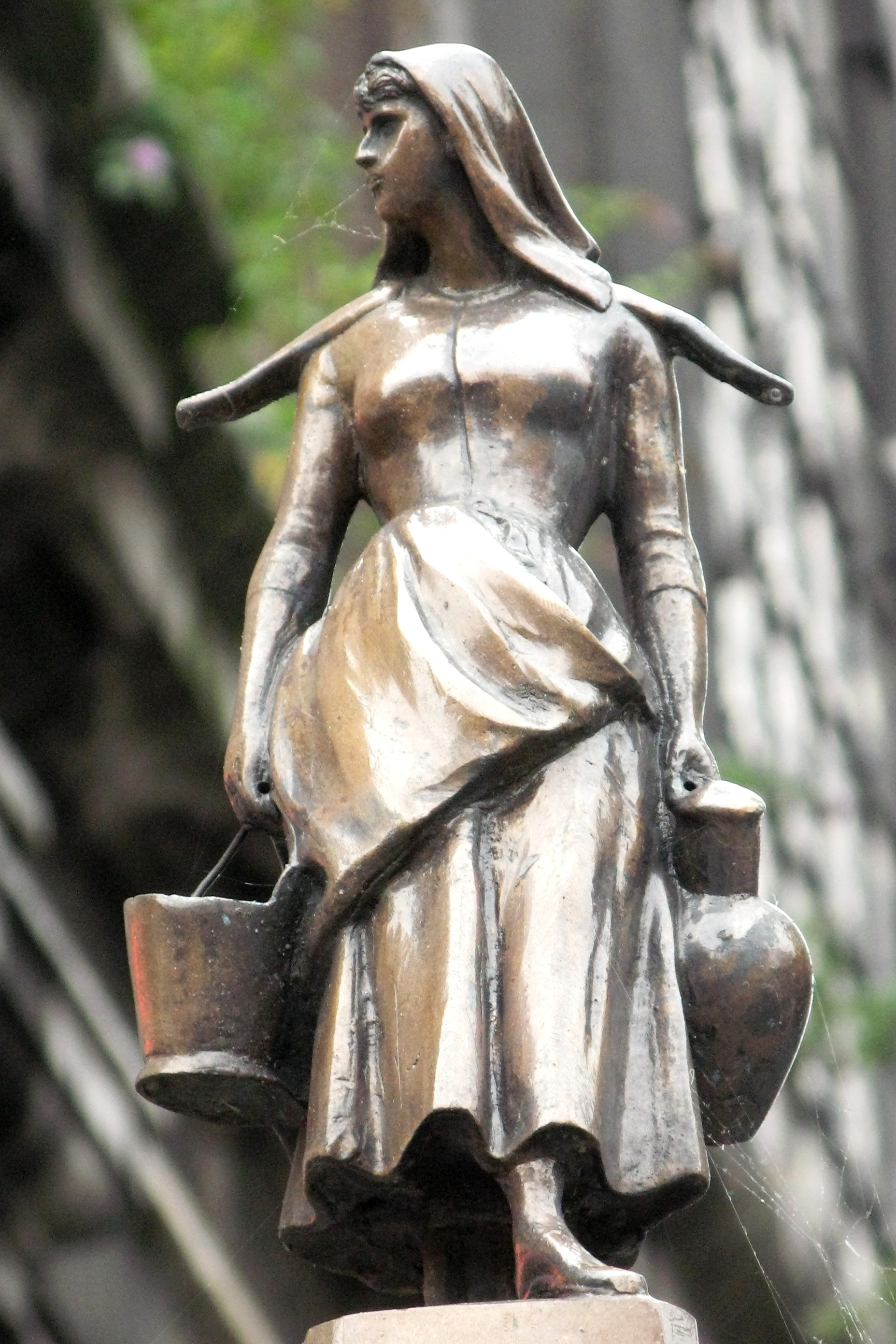 La Porteuse d'eau sur la Fontaine Montefiore En Neuvice à Liège